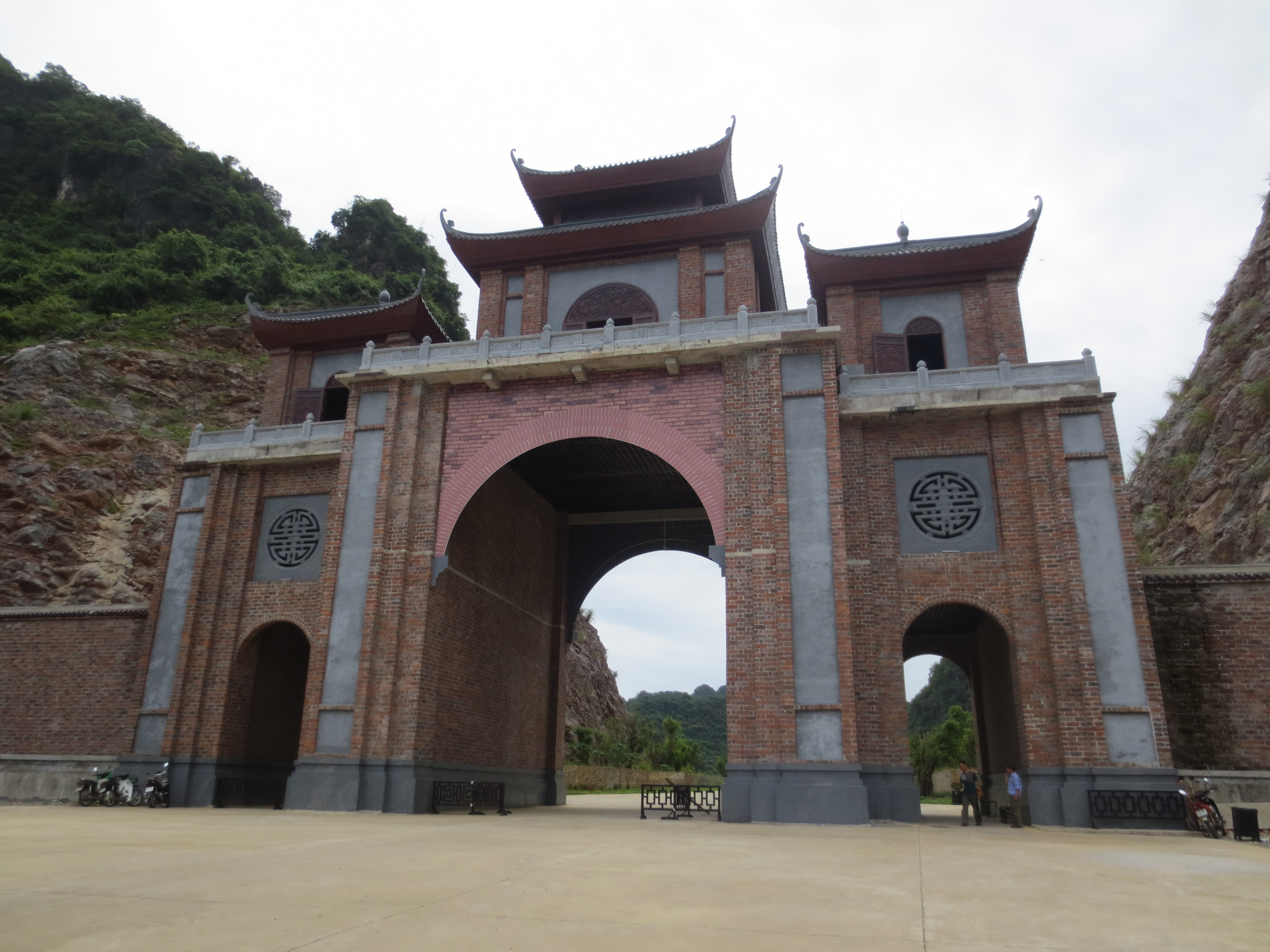 Cổng Thiên Môn Đàn Kính Thiên Tràng An, Ninh Bình